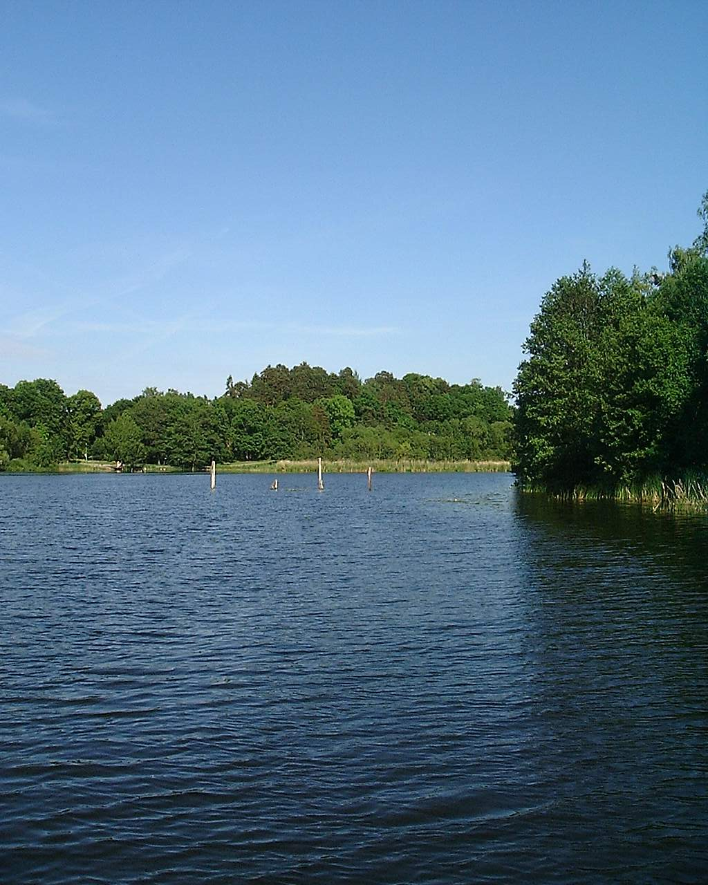 Laduviken, Djurgården, Stockholm, Sweden.